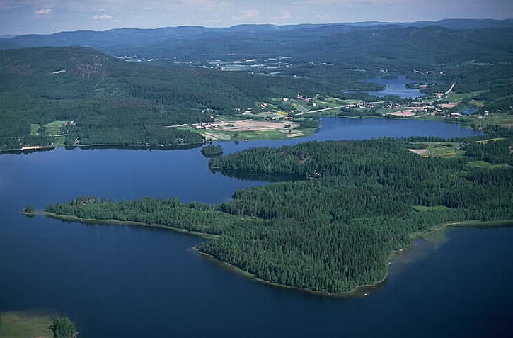 (Fornlämningsnummer, RAÄnr 2482:3, 2482:4, 2482:5, 2482:6, 2482:7.) Motiv: Gallsätter Nyckelord: Flygbilder, Riksintressen, Världsarv Kategori: Insjömiljöer (Fornlämningsnummer, RAÄnr 2482:3, 2482:4, 2482:5, 2482:6, 2482:7.).